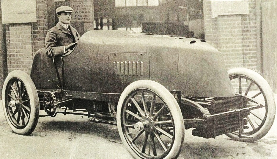 Charles Rolls à Welbeck en octobre 1903 (136.440 kmh sur Mors Z) - La Vie au Grand Air du 23 octobre 1903, p.779